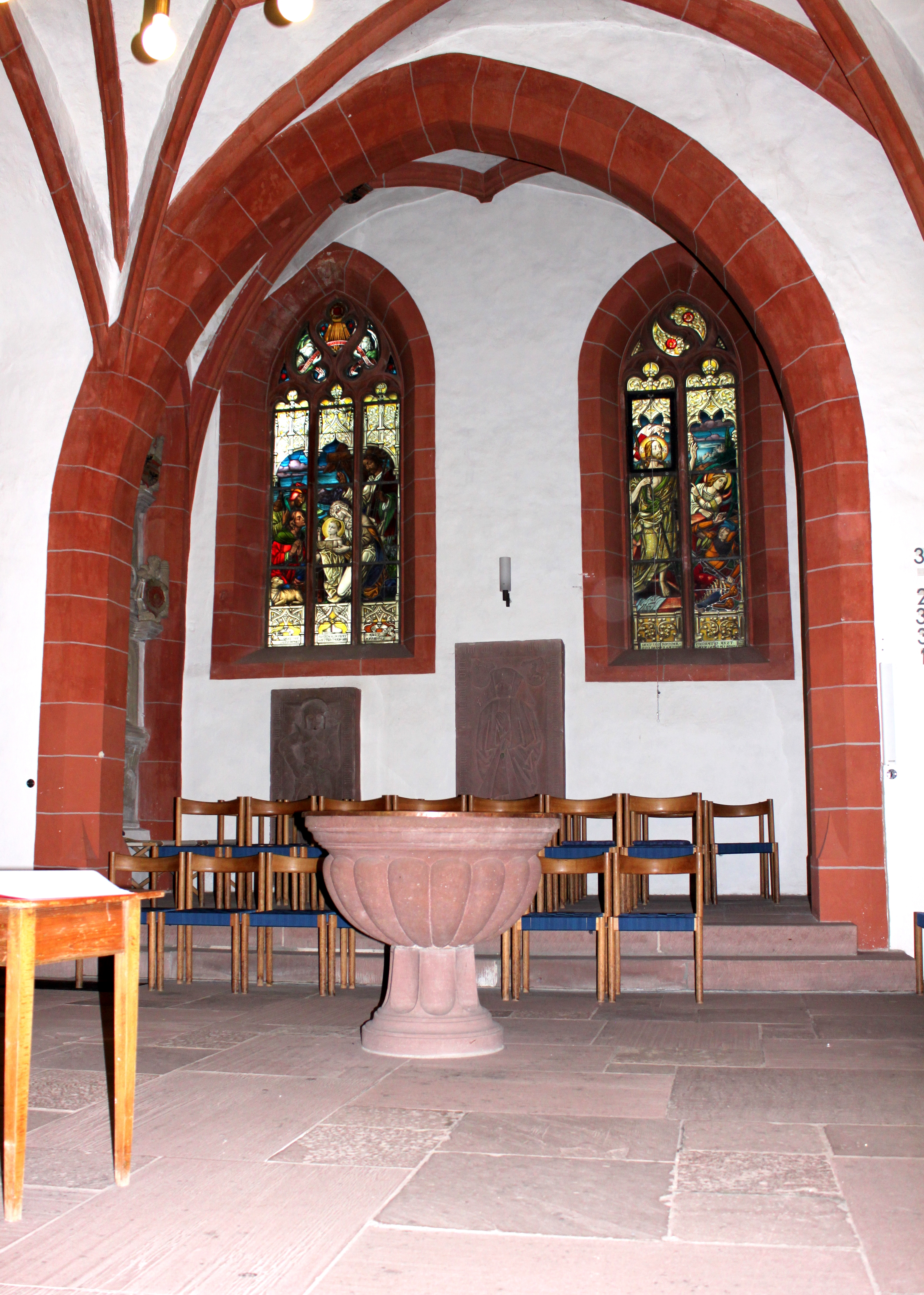 Stadtkirche Michelstadt